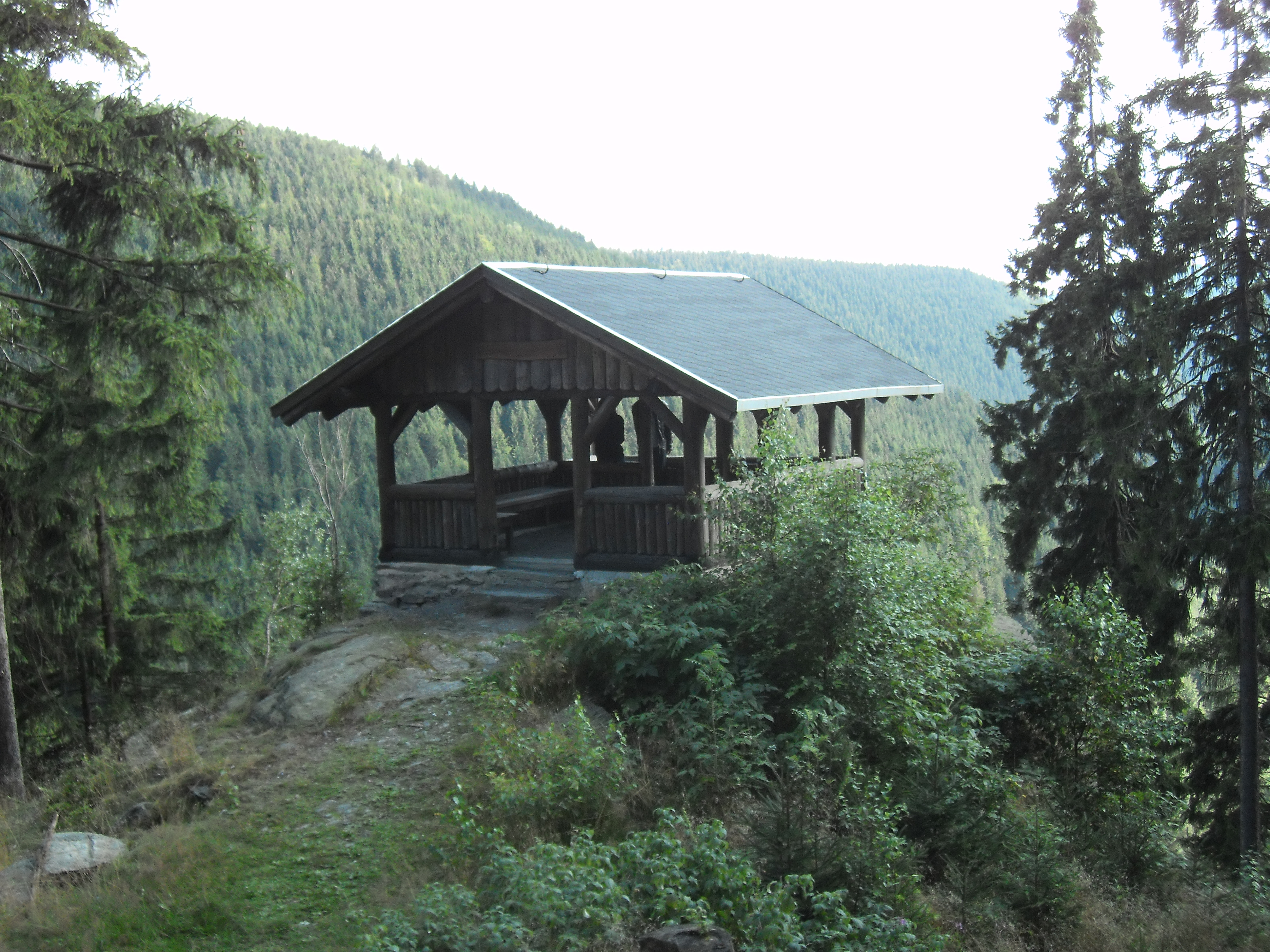 Die Schutzhütte Felsenhäuschen auf dem Lauschenstein, 1886 erbaut